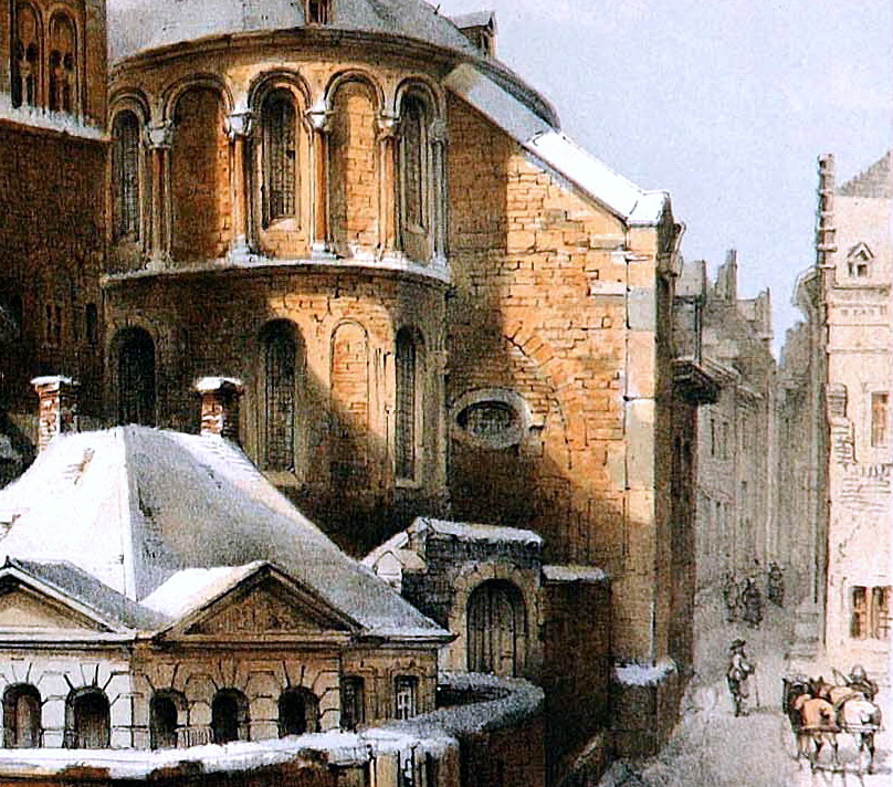 Kleurenlithografie door Alexander Schaepkens van de Onze-Lieve-Vrouwekerk in Maastricht. Op de voorgrond rechts het wachthuis van de Onze-Lieve-Vrouwepoort. Collectie RHCL Maastricht, LGOG 1047.